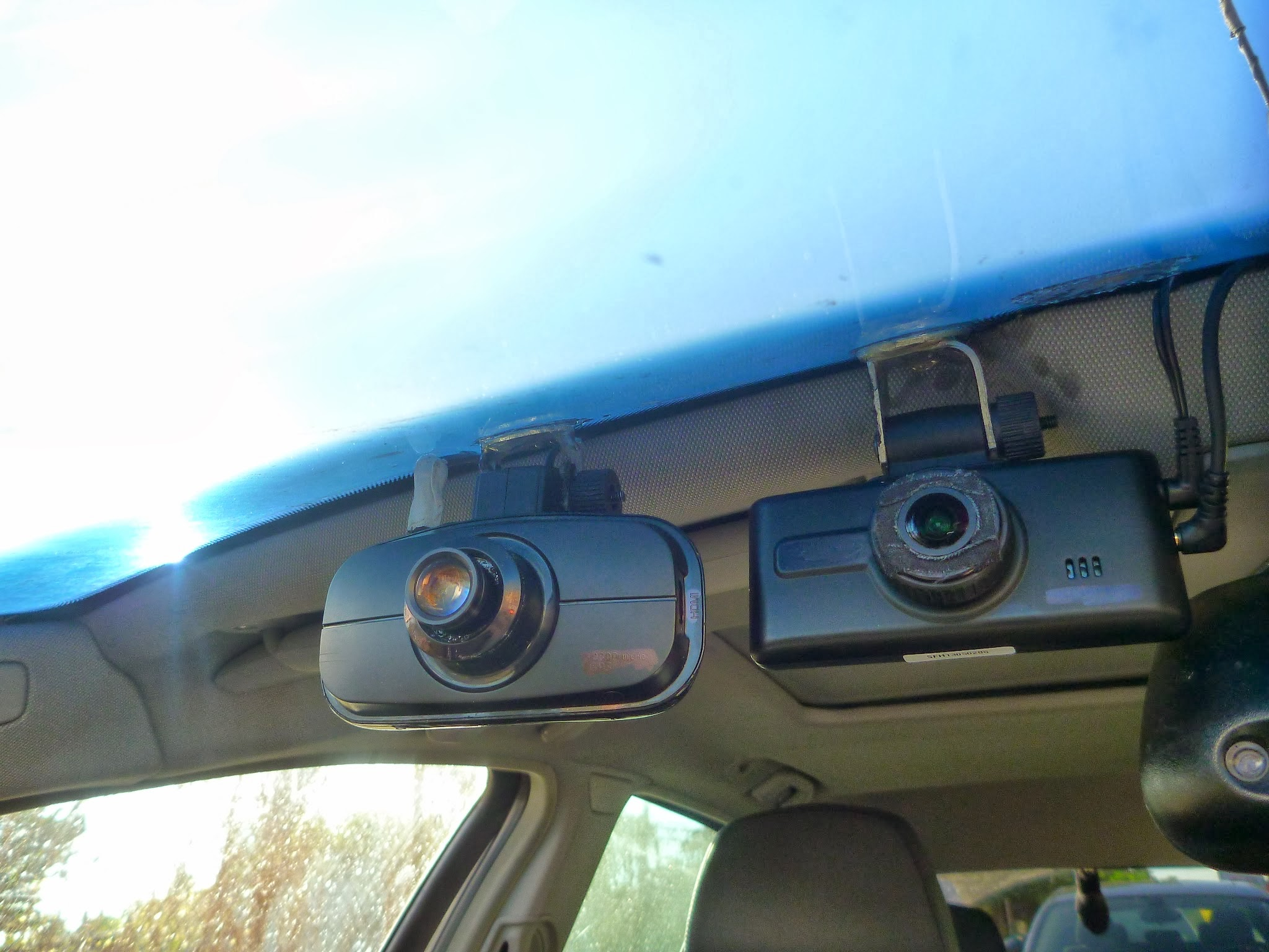 Dashcam image